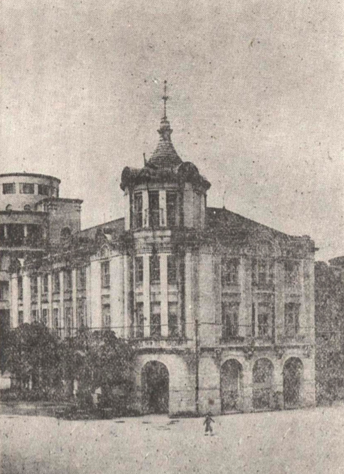 中文（台灣）: 近海郵船基隆支店，位於基隆市明治町一丁目18番地